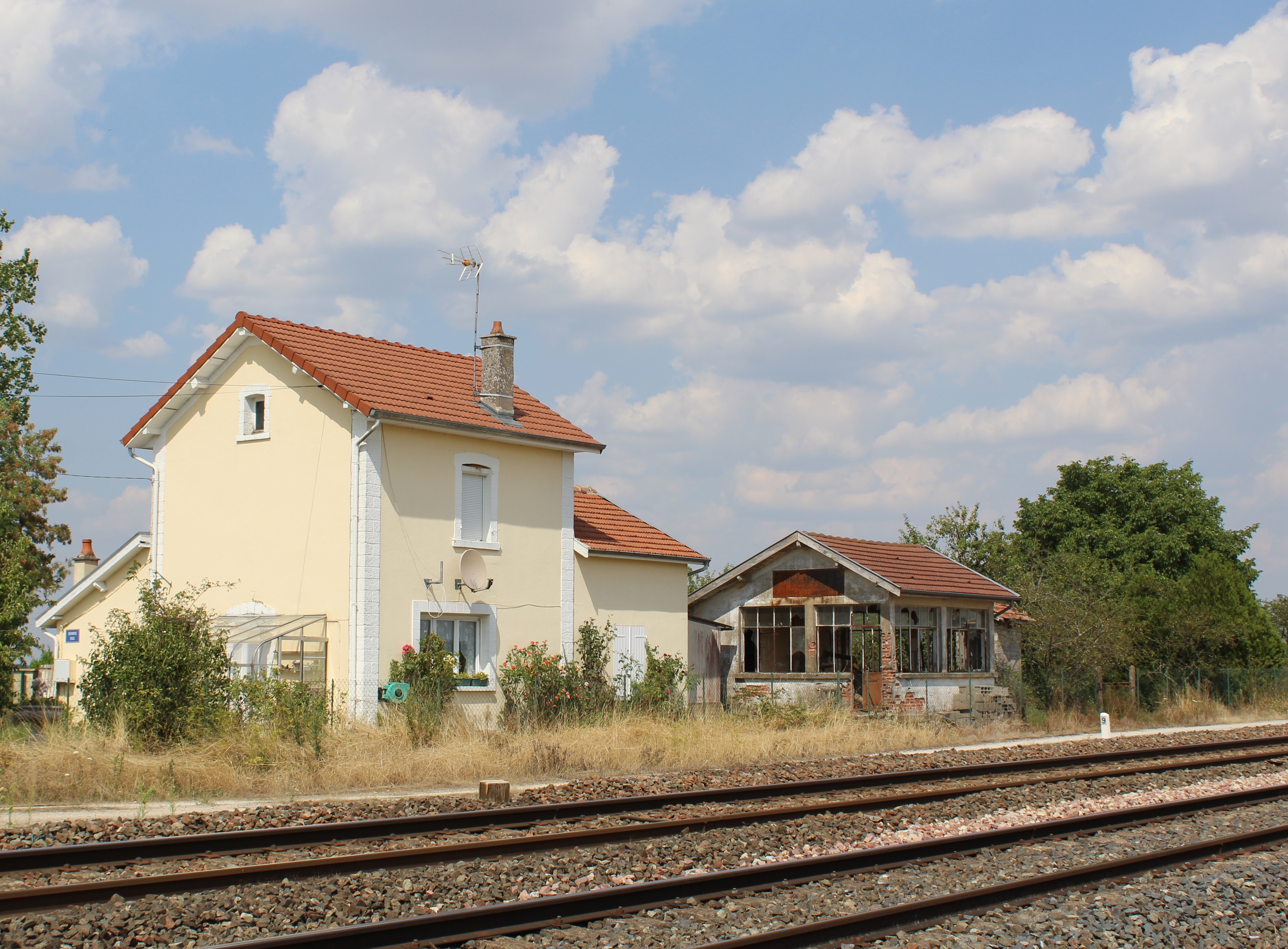 Maison de garde du passage à niveau. Ne pas confondre avec la maison de garde dite halte de Villiers-le-Sec, située au passage à niveau précédent et détruite dans la deuxième moitié du vingtième siècle.